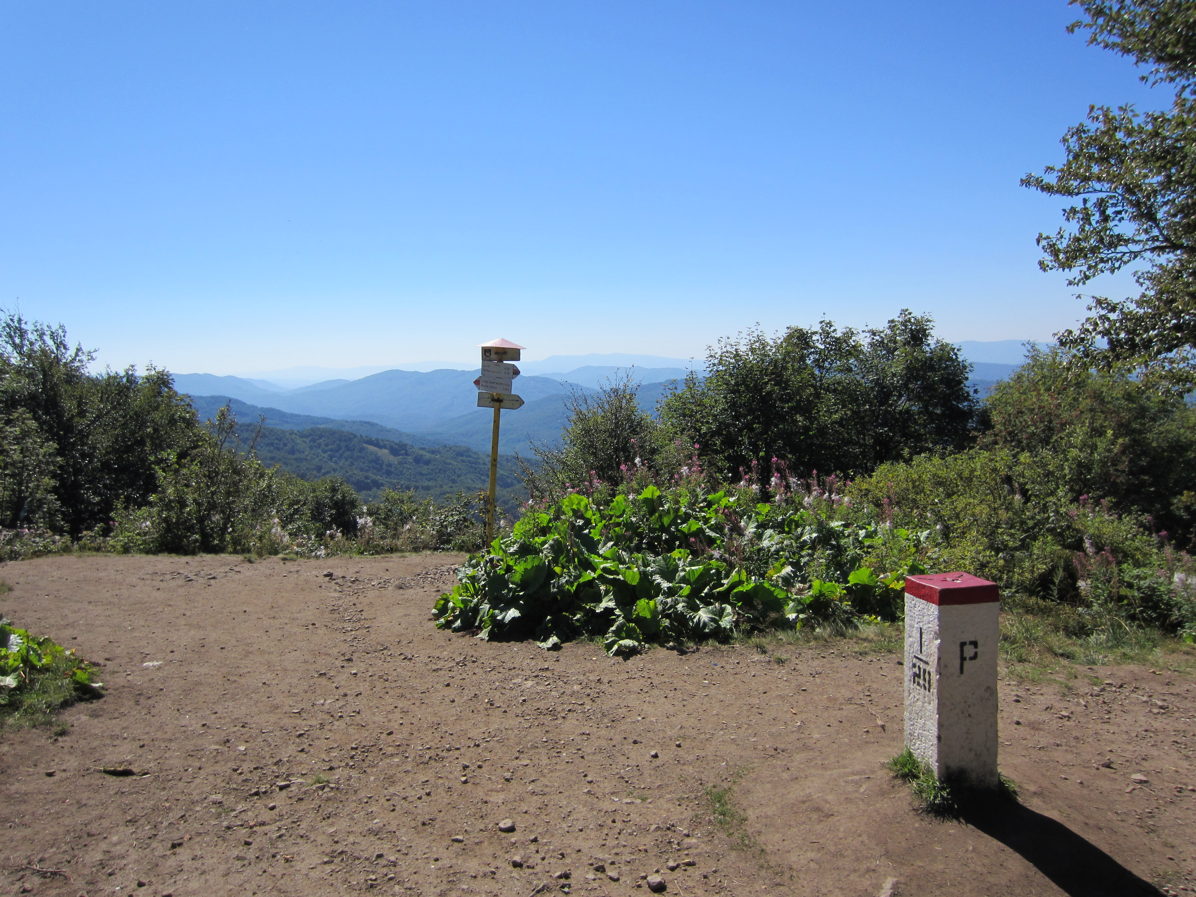 Vrchol Kruhliaka v auguste